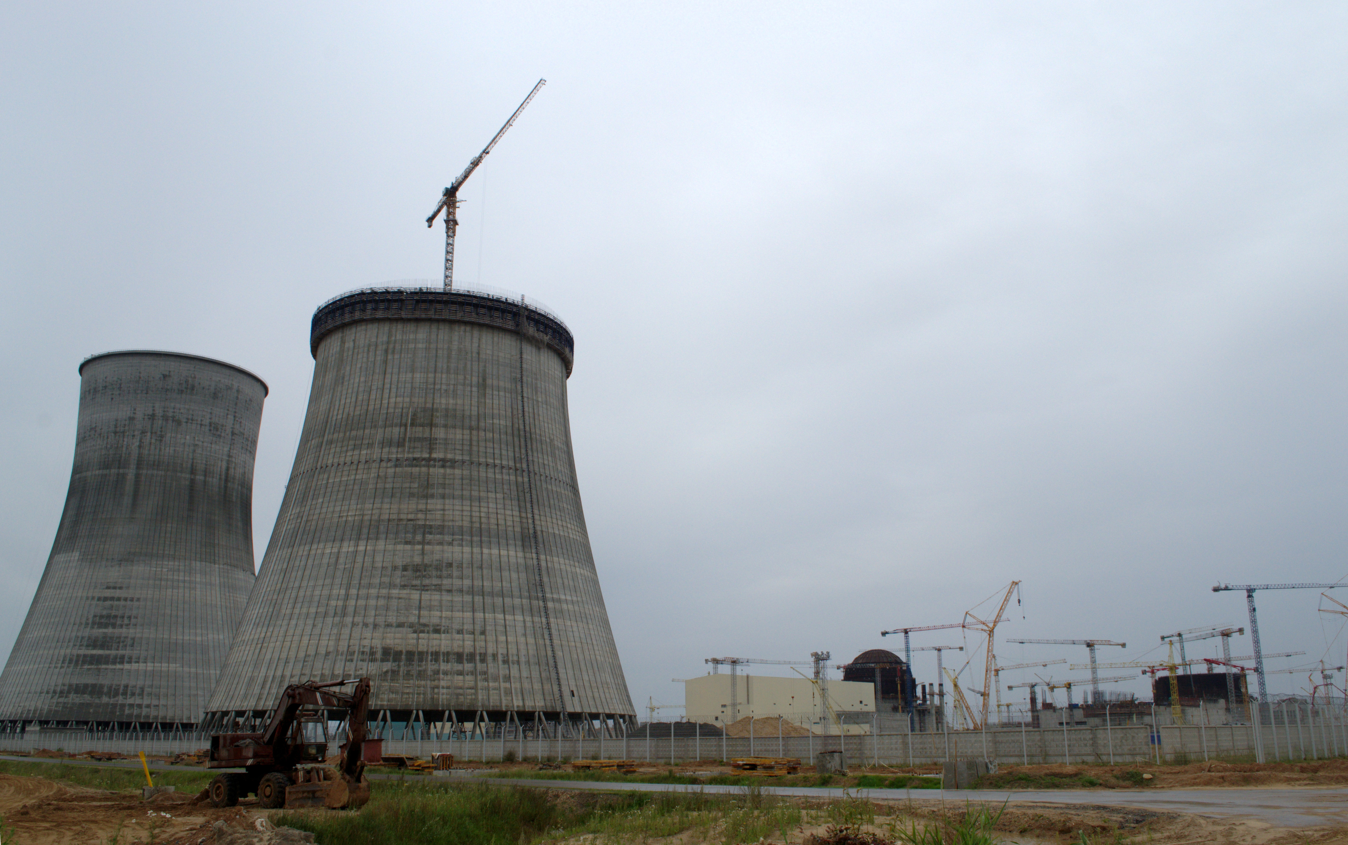 Беларуская (тарашкевіца): Будаўніцтва Беларускай АЭС пад Астраўцом, 2016.